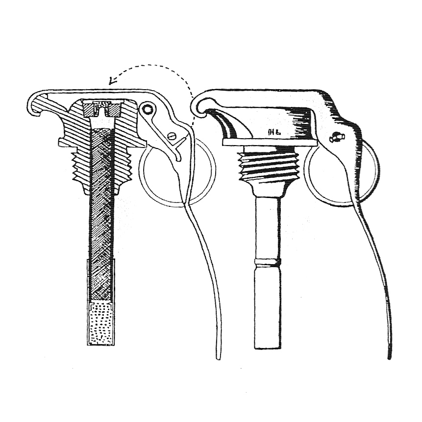 Bouchon allumeur français H.Leblanc Mod.1917, qui n'a jamais été retenu par l'armée française.